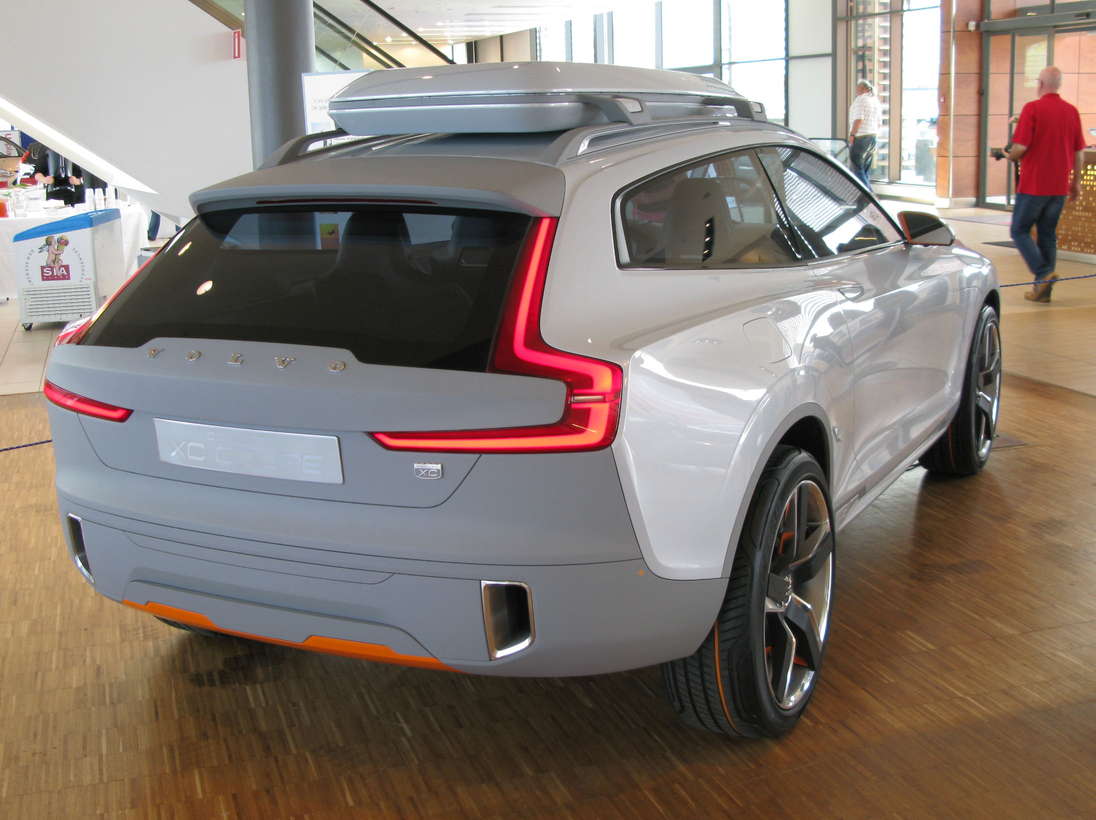 Volvo Concept XC Coupe